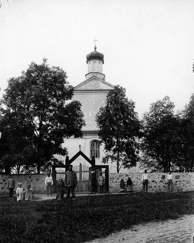 Беларуская (тарашкевіца): Падароск (Padarosk). Траецкая царква